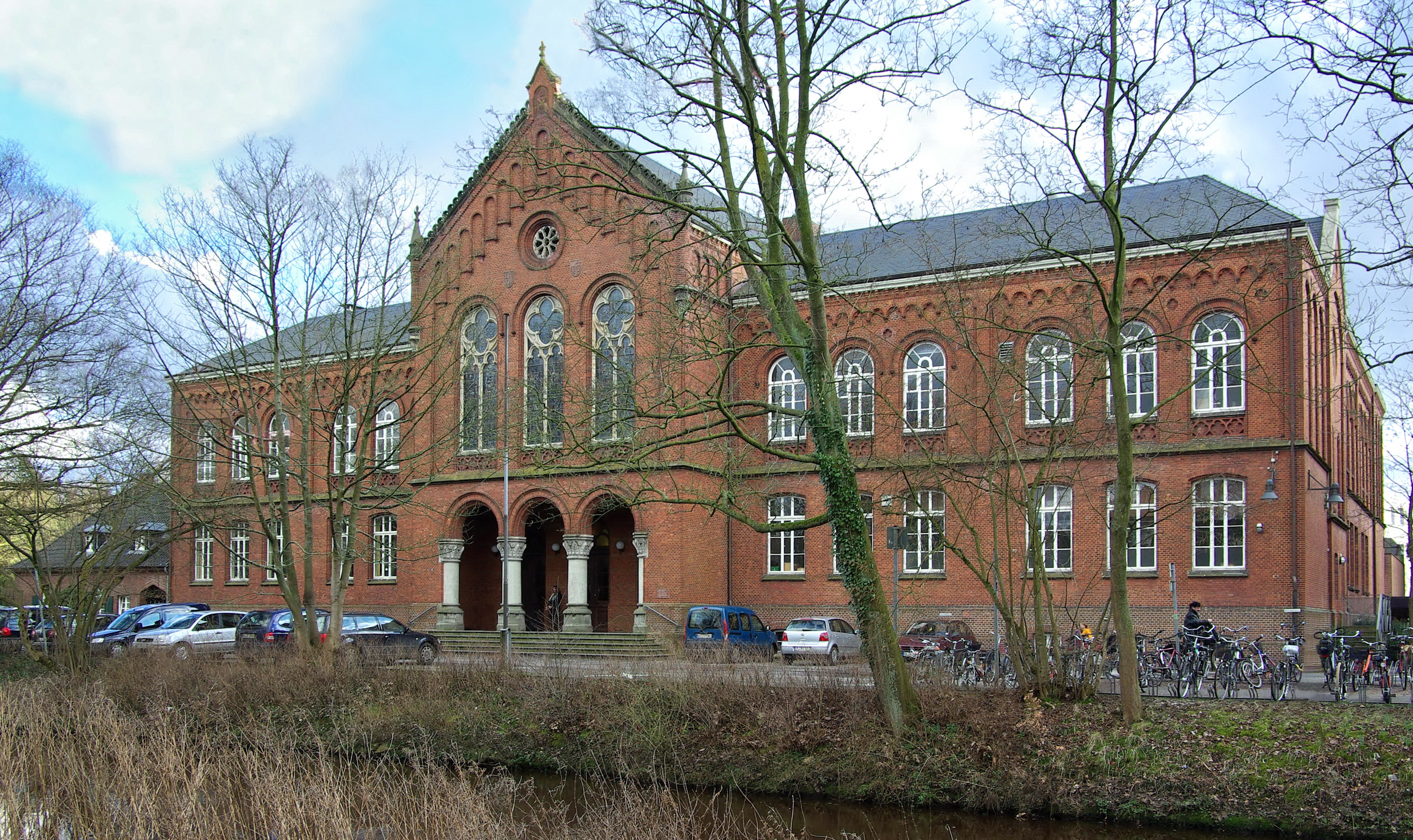 Gymnasium Altes Gymnasium Oldenburg in Oldenburg, Blick über die Haaren